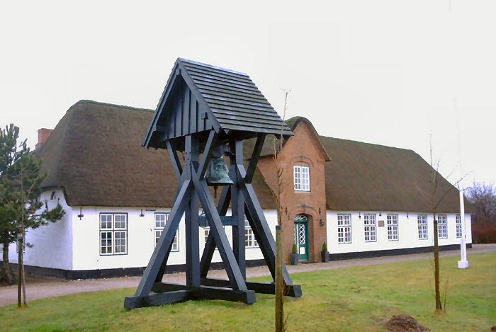 Emmerske Bedehus, bygget 1730 som kirke og skole for Tønder landsogn, første præst var Hans Adolph Brorson